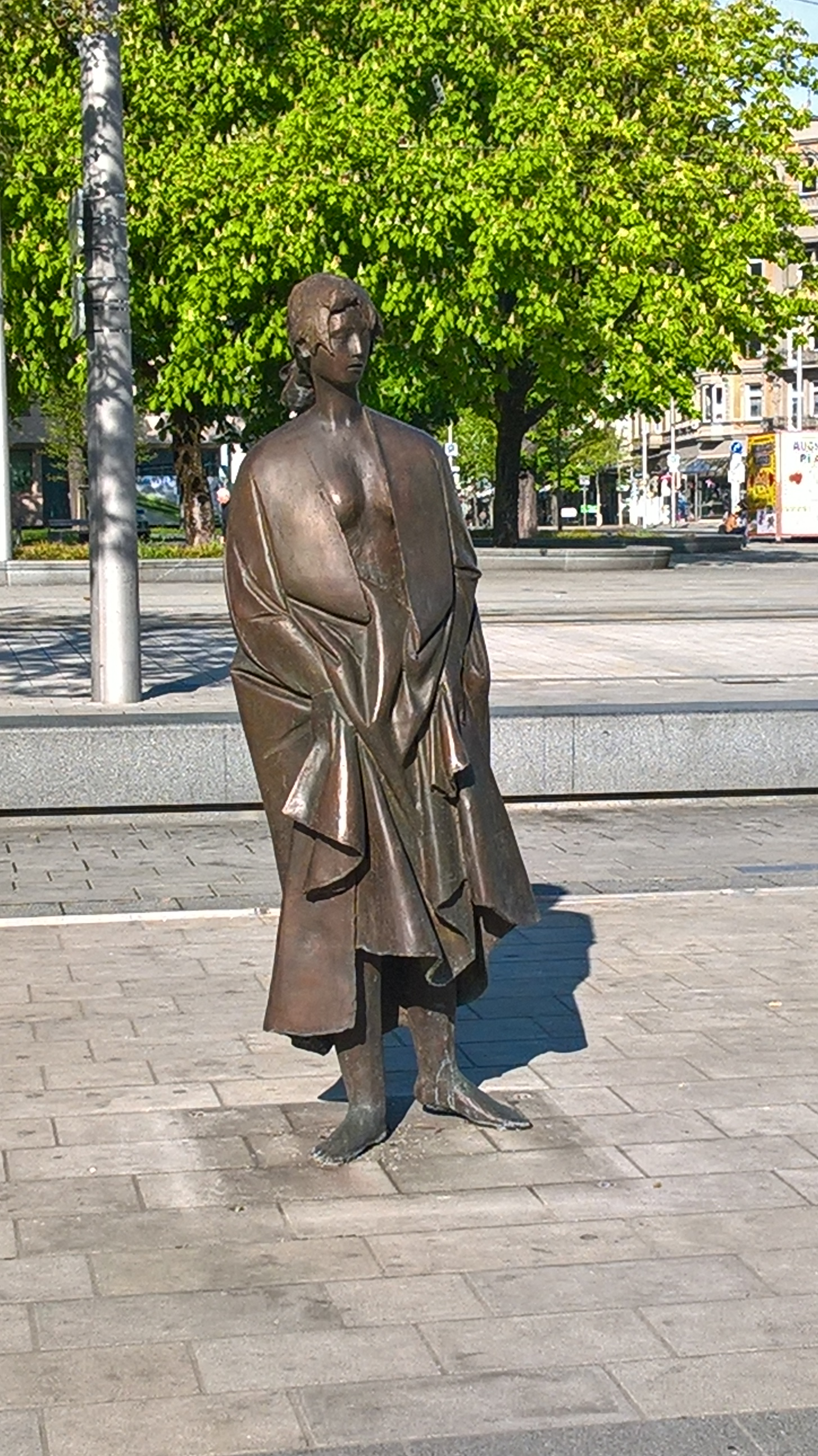 Figur des Kammerfräuleins des Manzù-Brunnens in Augsburg, Königsplatz